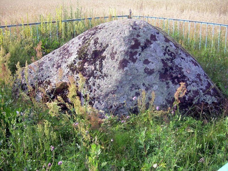 Укропенка. Камень-горка